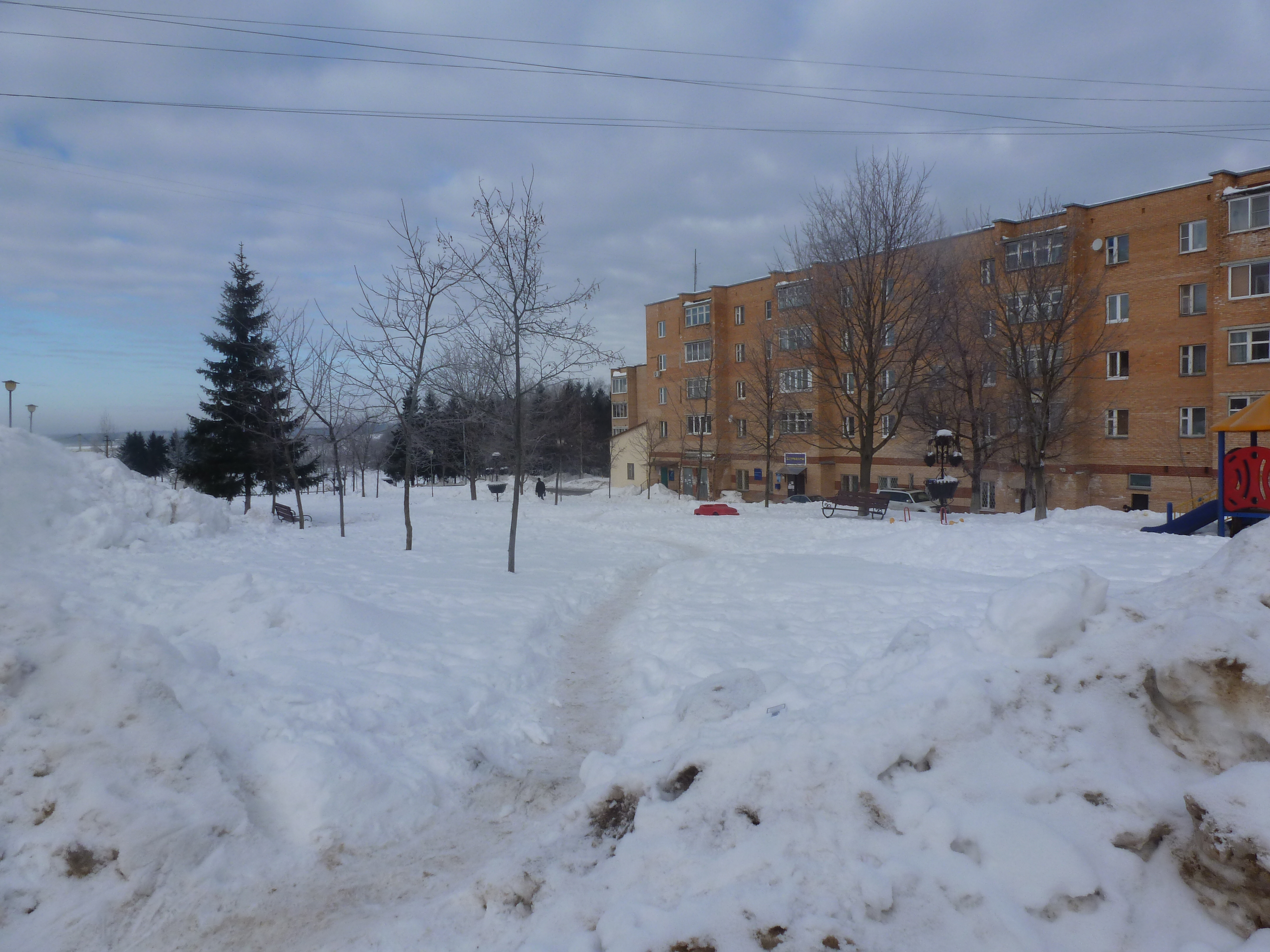 Jerŝovo (Odincova distrikto)